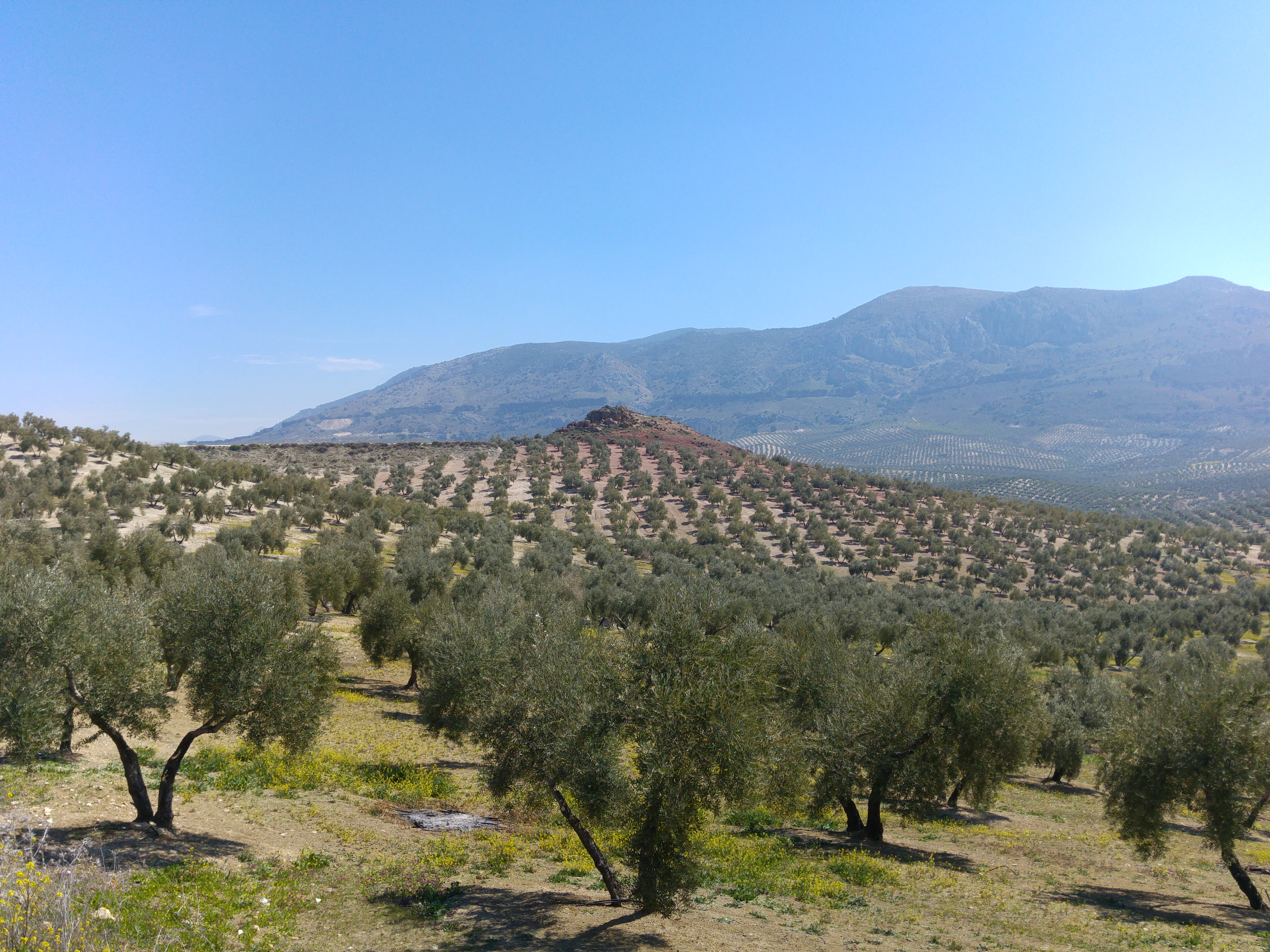 La loma de Torre Bermeja, en el término municipal de Mancha Real, con el color rojo característico del oligisto, por el cual le viene el nombre de bermeja.